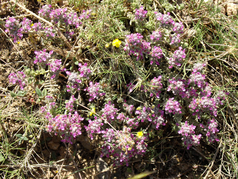 Teucrium gnaphalodes (syn. Teucrium polium subsp. gnaphalodes)